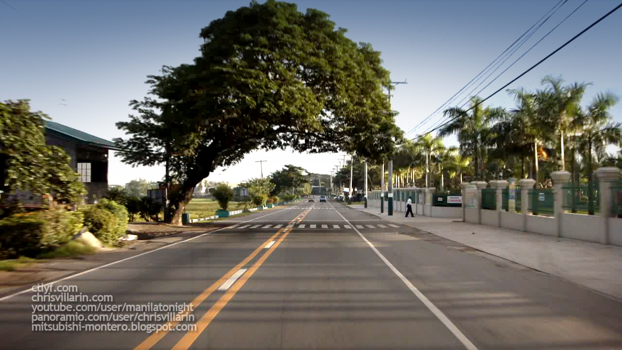 Maharlika Highway AH26, San Rafael, Philippines